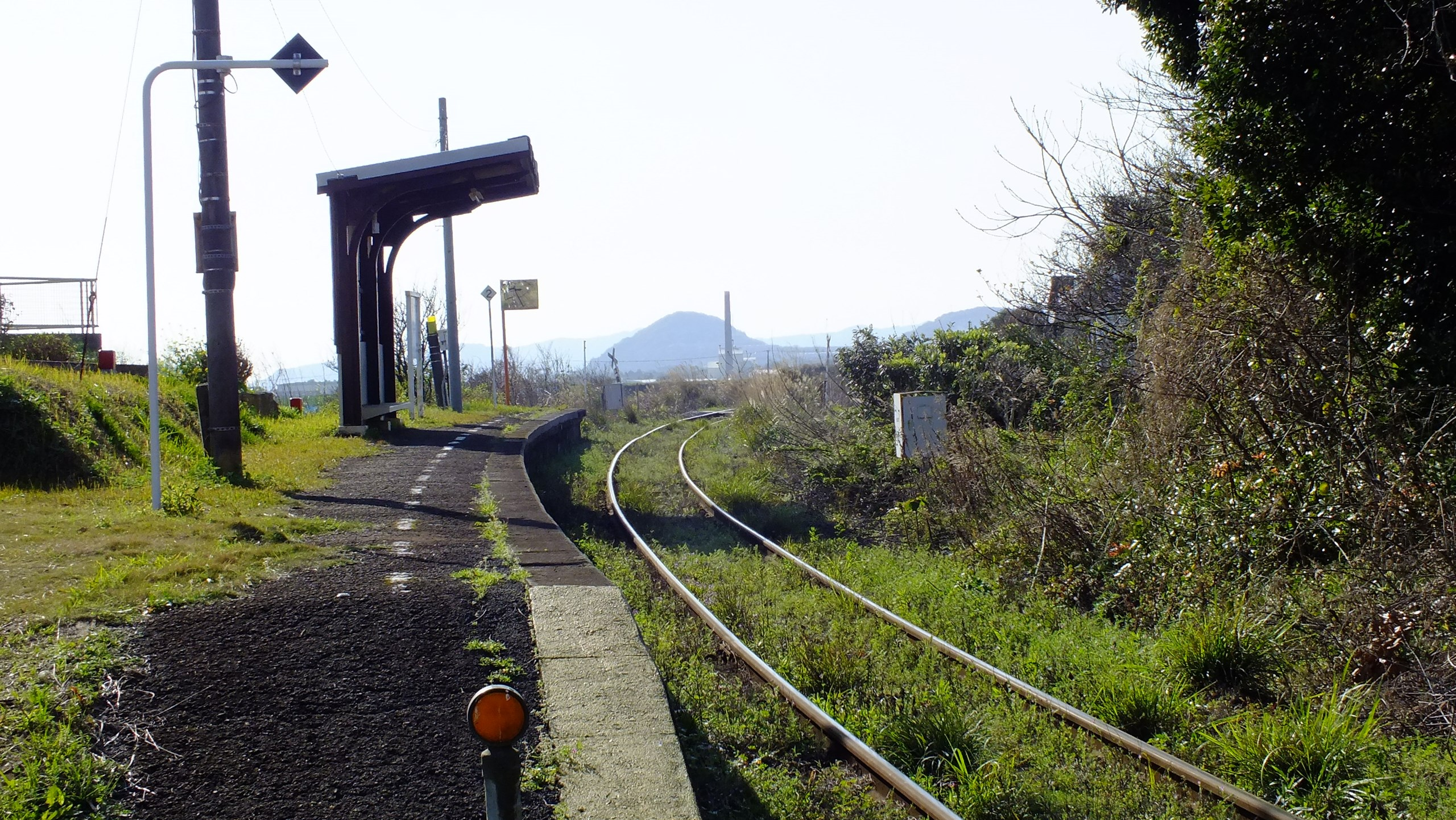 JR指宿枕崎線白沢駅 鹿児島県枕崎市 2019年3月